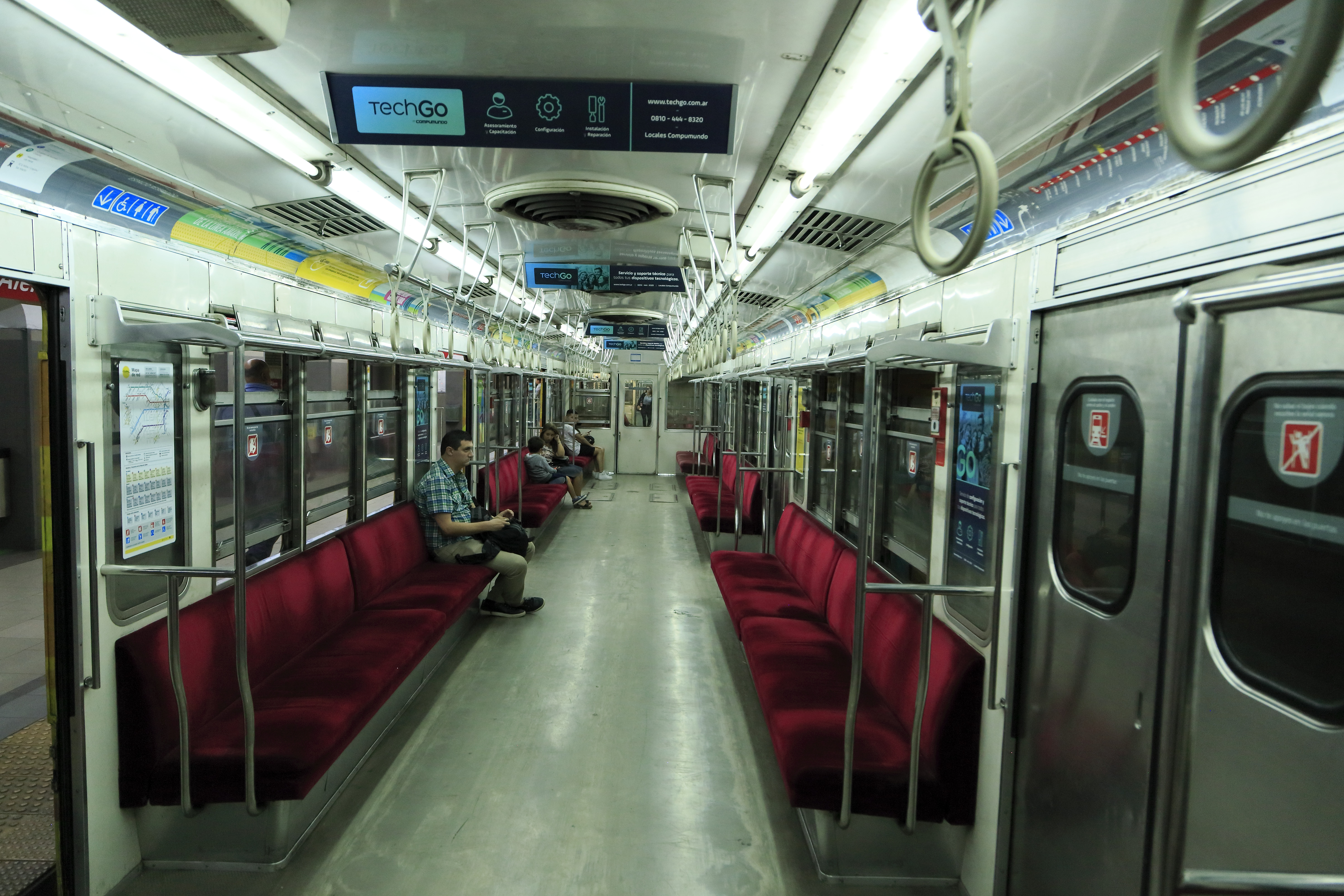 Linie B, Mitsubishi-Wagen Reihe 500. Die Wagen der Linie B, die als Verlängerung der Ferrocarril Central de Buenos Aires vom Bahnhof Fedrico Lacroze ins Stadtzentrum gebaut wurde und deshalb etwa das argentinische Regelspurlichtraumprofil bietet, sind mit 2,72 Metern deutlich breiter als die übrigen U-Bahn-Wagen der Stadt und trotzdem mussten sie mit Profilausgleichsbohlen versehen werden.